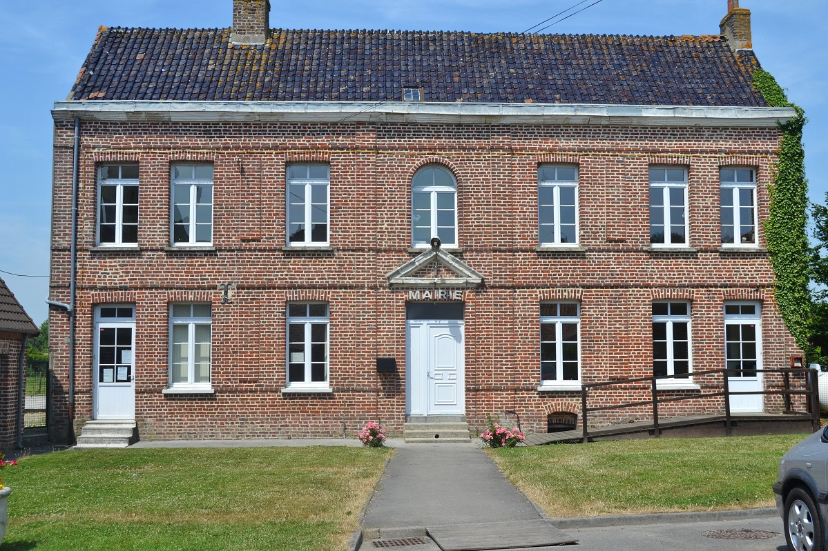 La Mairie